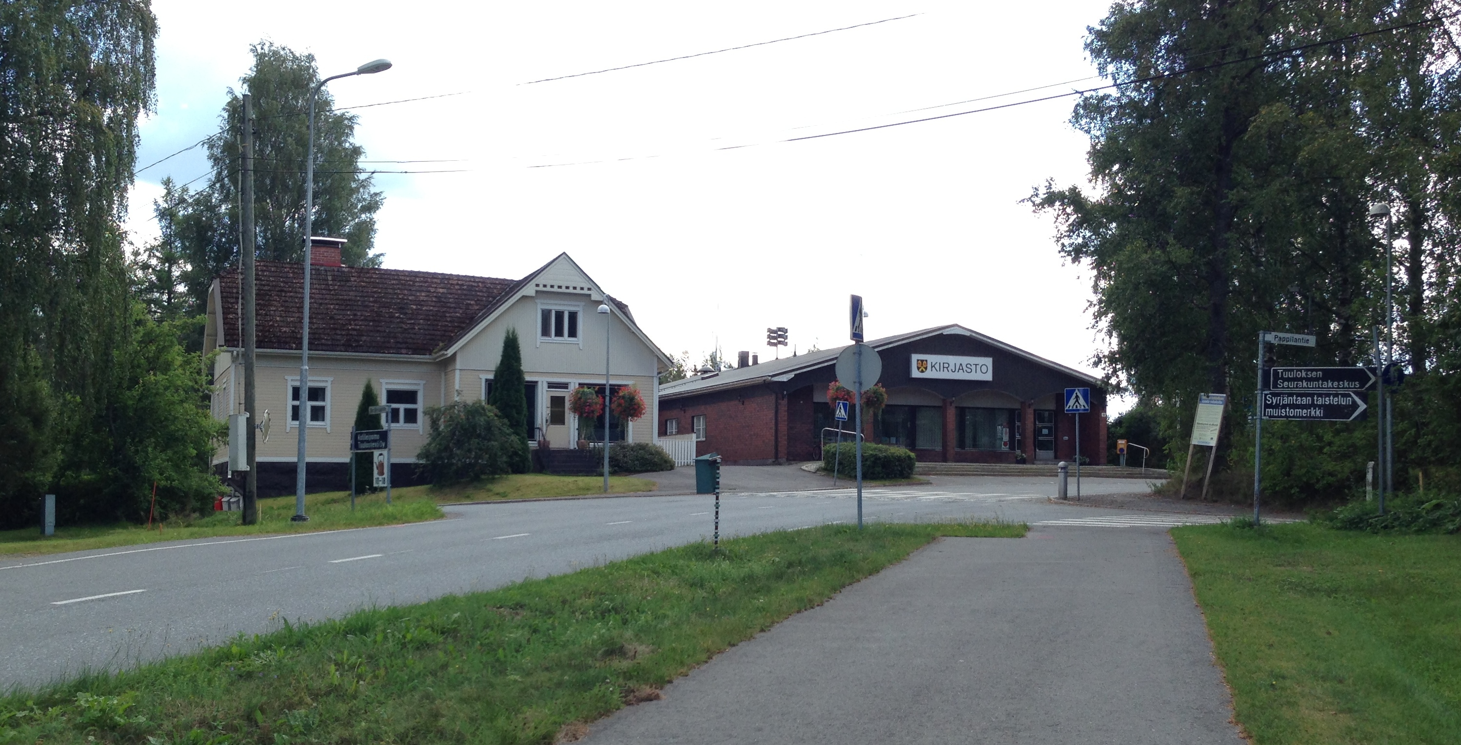 Syrjäntaan kylää Hämeenlinnan Tuuloksessa.